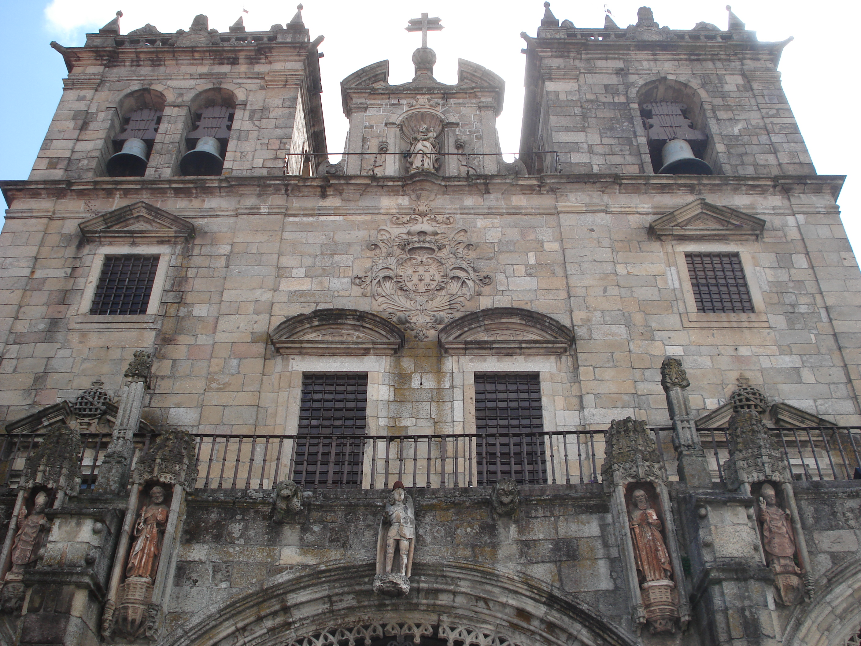 Fachada da Sé de Braga vista de perto.